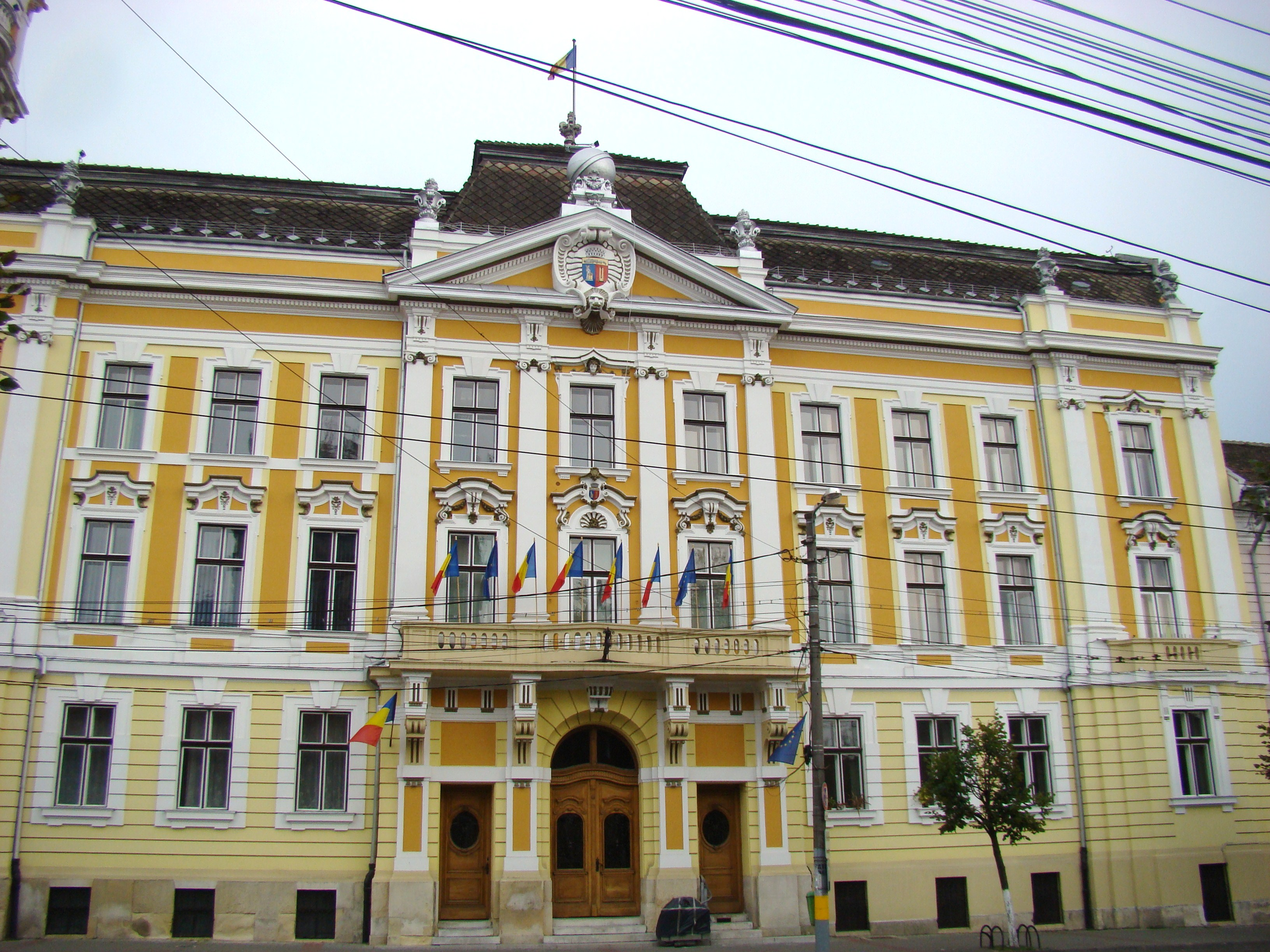 Clădire monument istoric, Calea Moților, nr.1-3 (în prezent Prefectura Cluj)